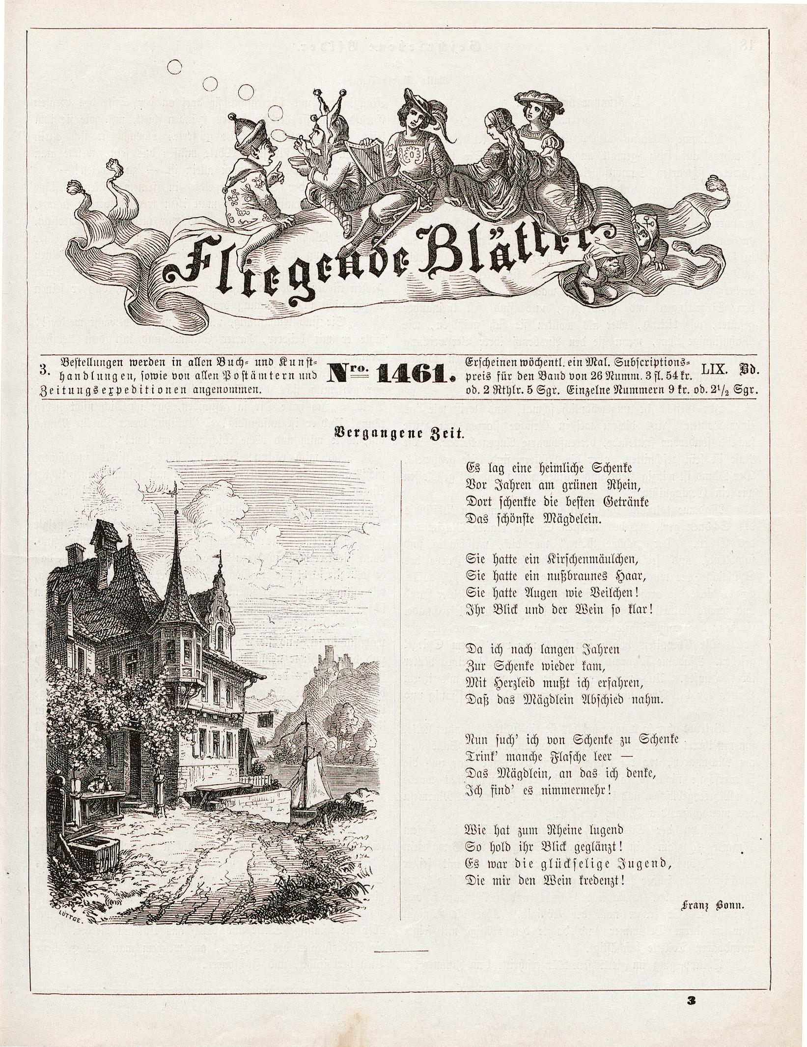 Fliegende Blätter, Band 59, Seite 17